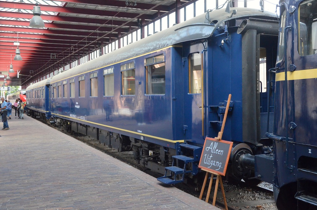 Nederlands Spoorwegmuseum rijtuig NS 8. Foto: Erik Swierstra.